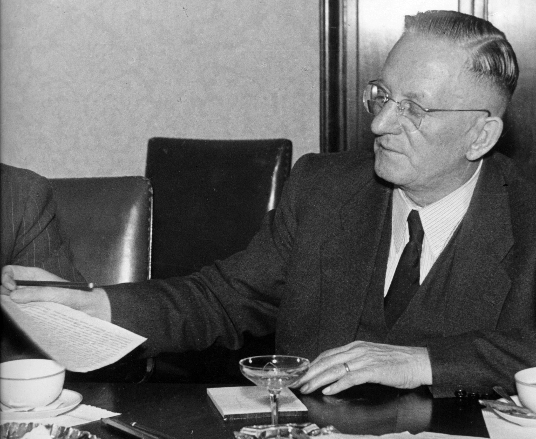 Foto von Friedrich Bödecker, dem Pädagogen, auf denn die Friedrich-Bödecker-Kreise in Deutschland zurückgehen